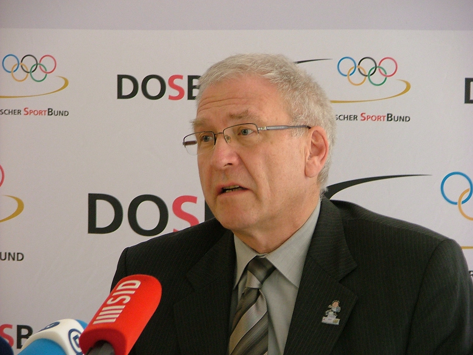 Michael Vesper, Generaldirektors des Deutschen Olympischen Sportbundes